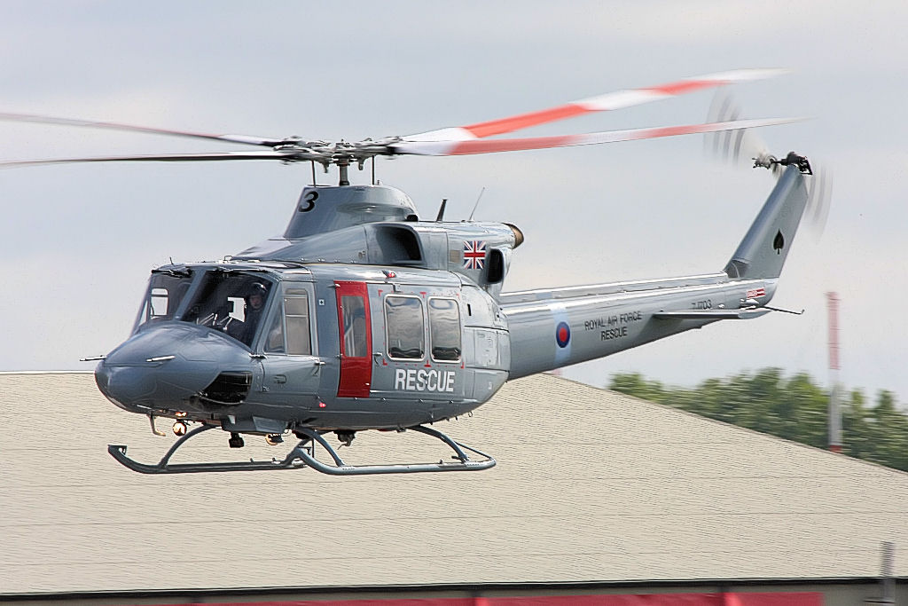 Griffin - RIAT 2008